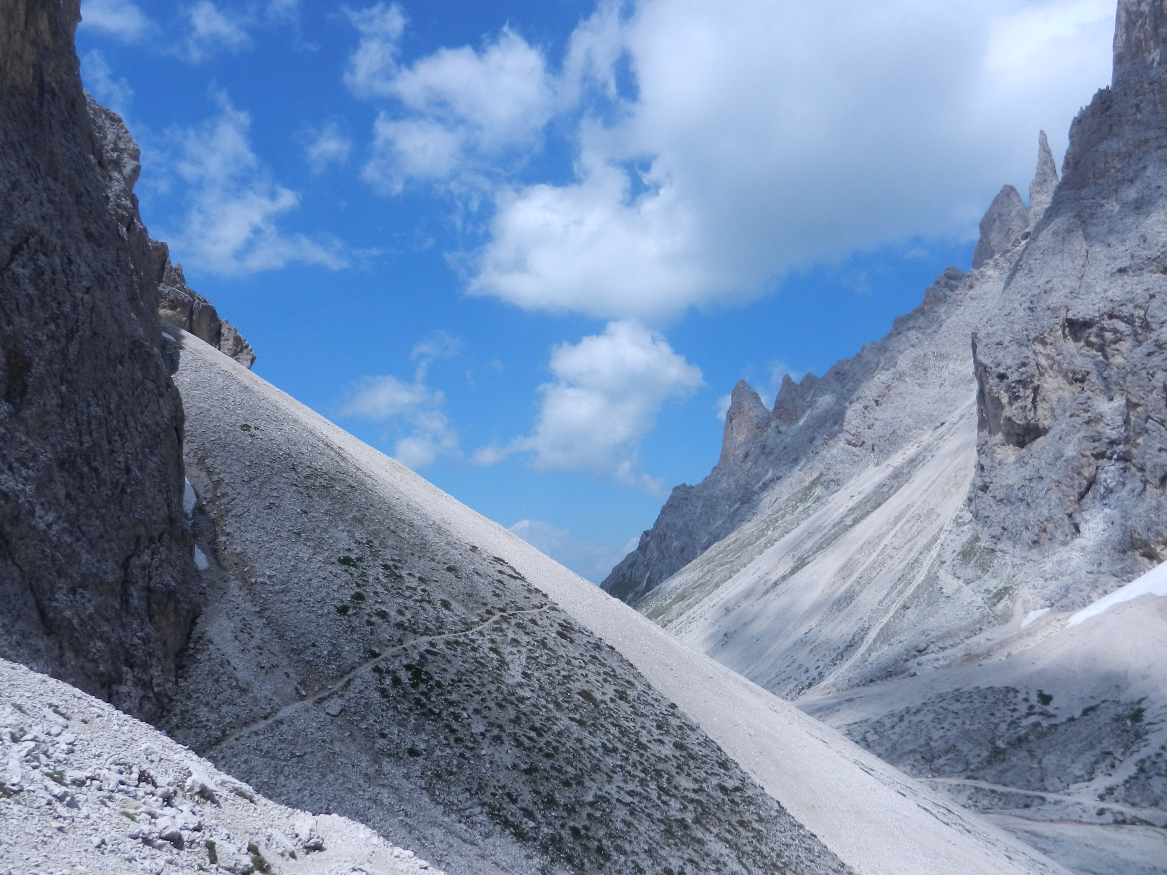 diagonale nel cuore